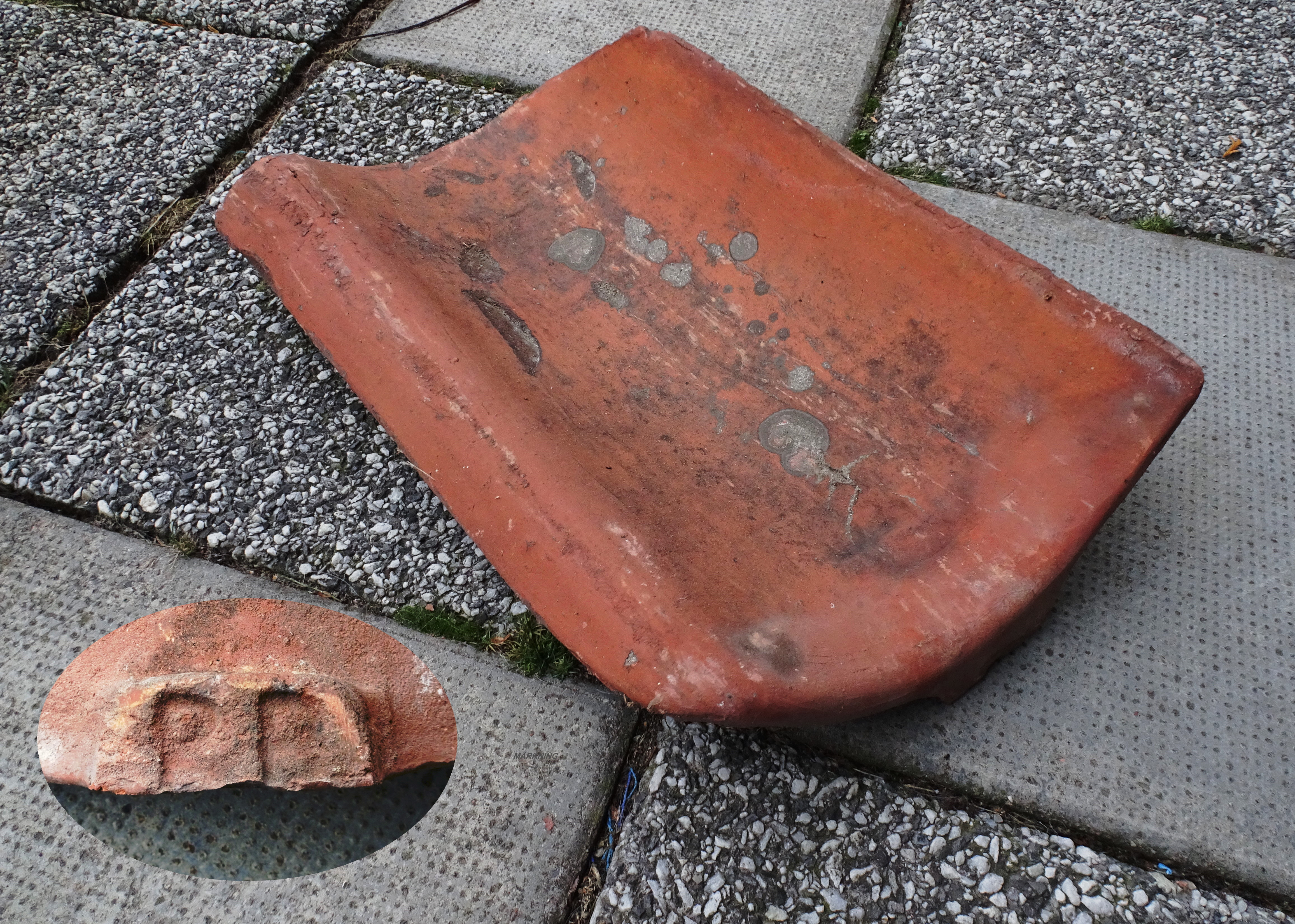 En takpanna från Ranghildsborgs tegelbruk, märkning "RB" på klacken, infälld t.v.